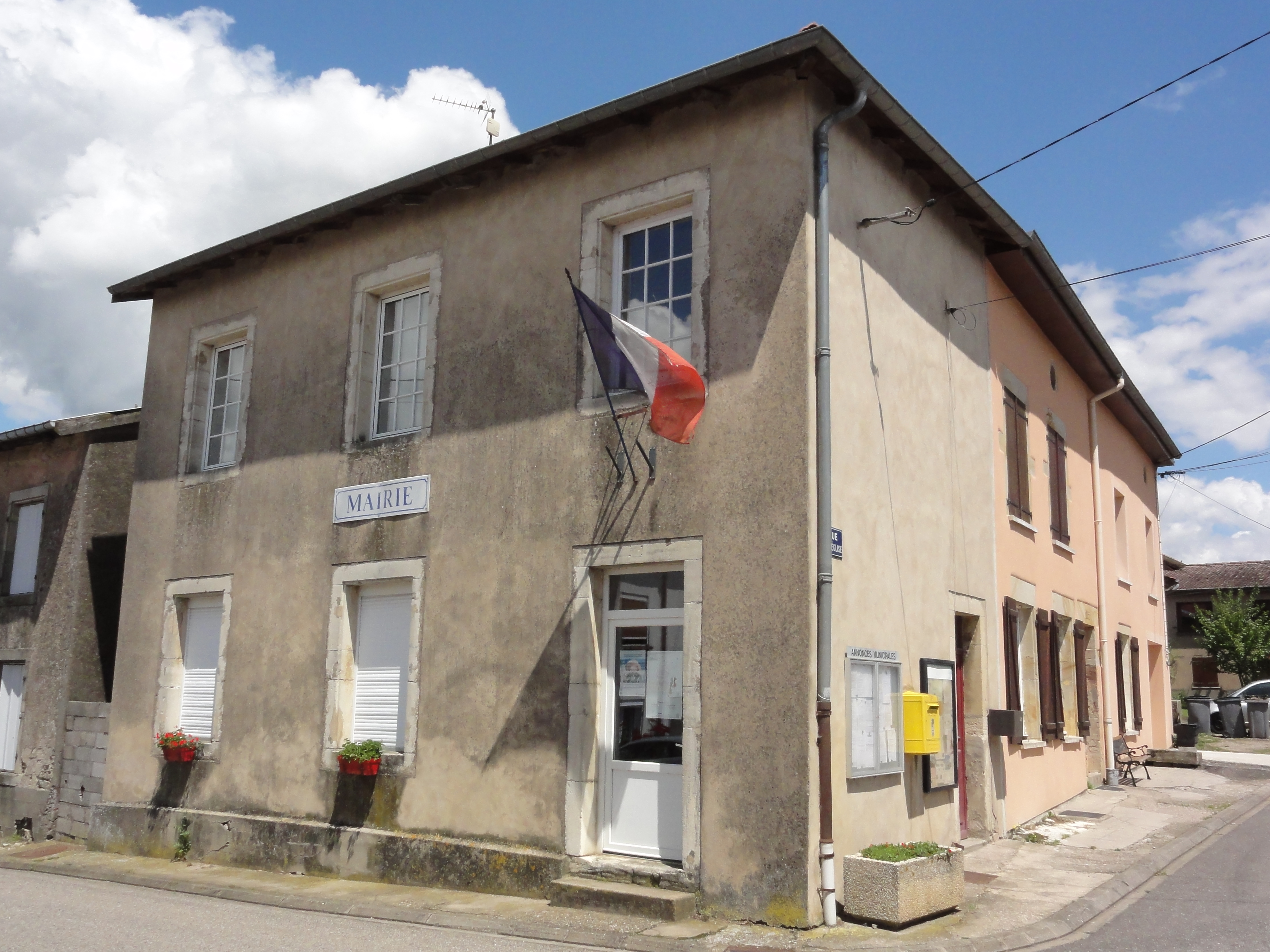 Serres (M-et-M) mairie